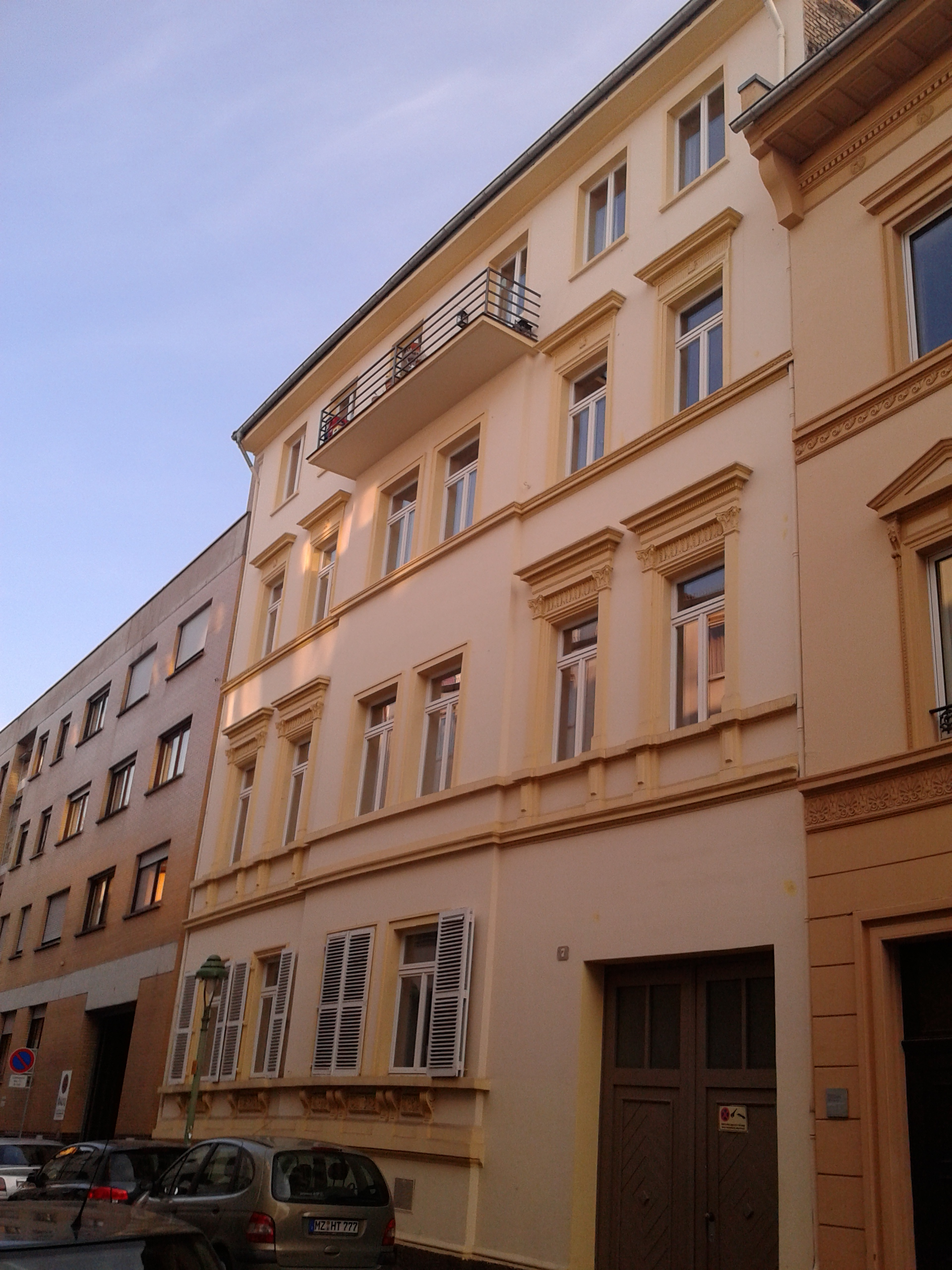 Baudenkmal Walpodenstraße 7 Mainz